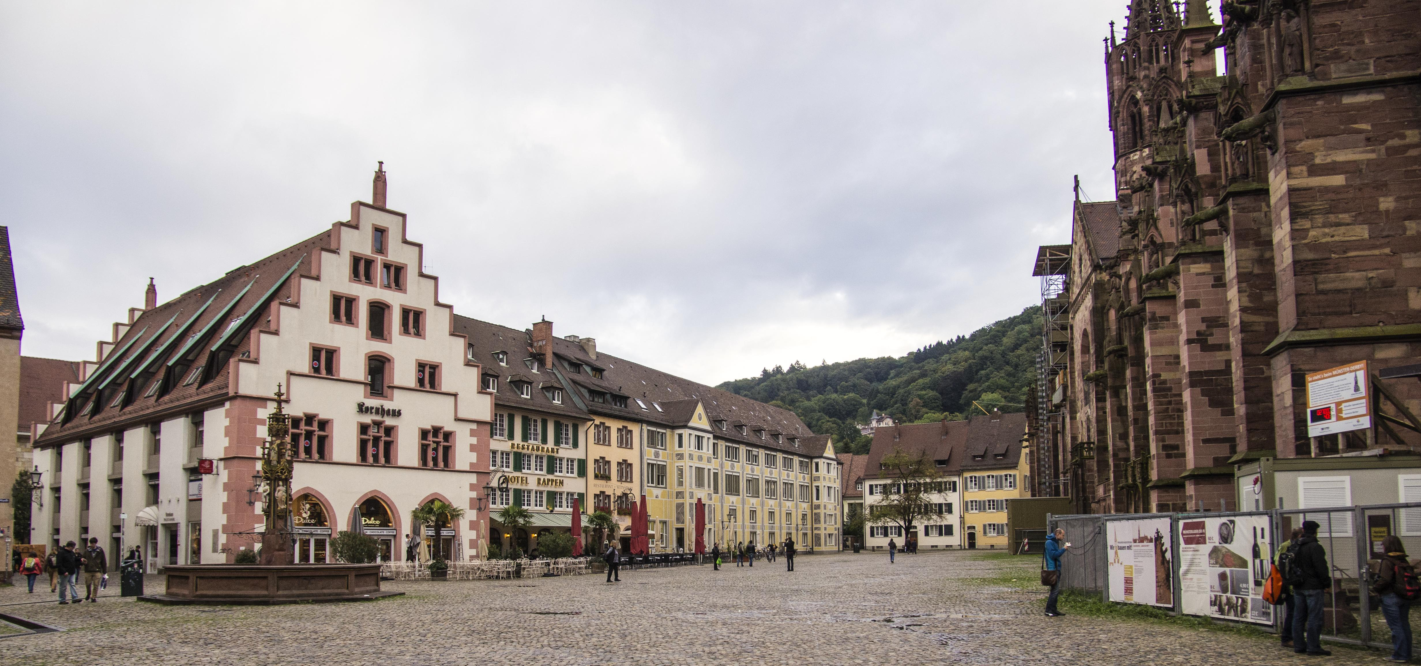 DFN Treffen am 12.09.2013 auf dem Freiburger Münsterplatz